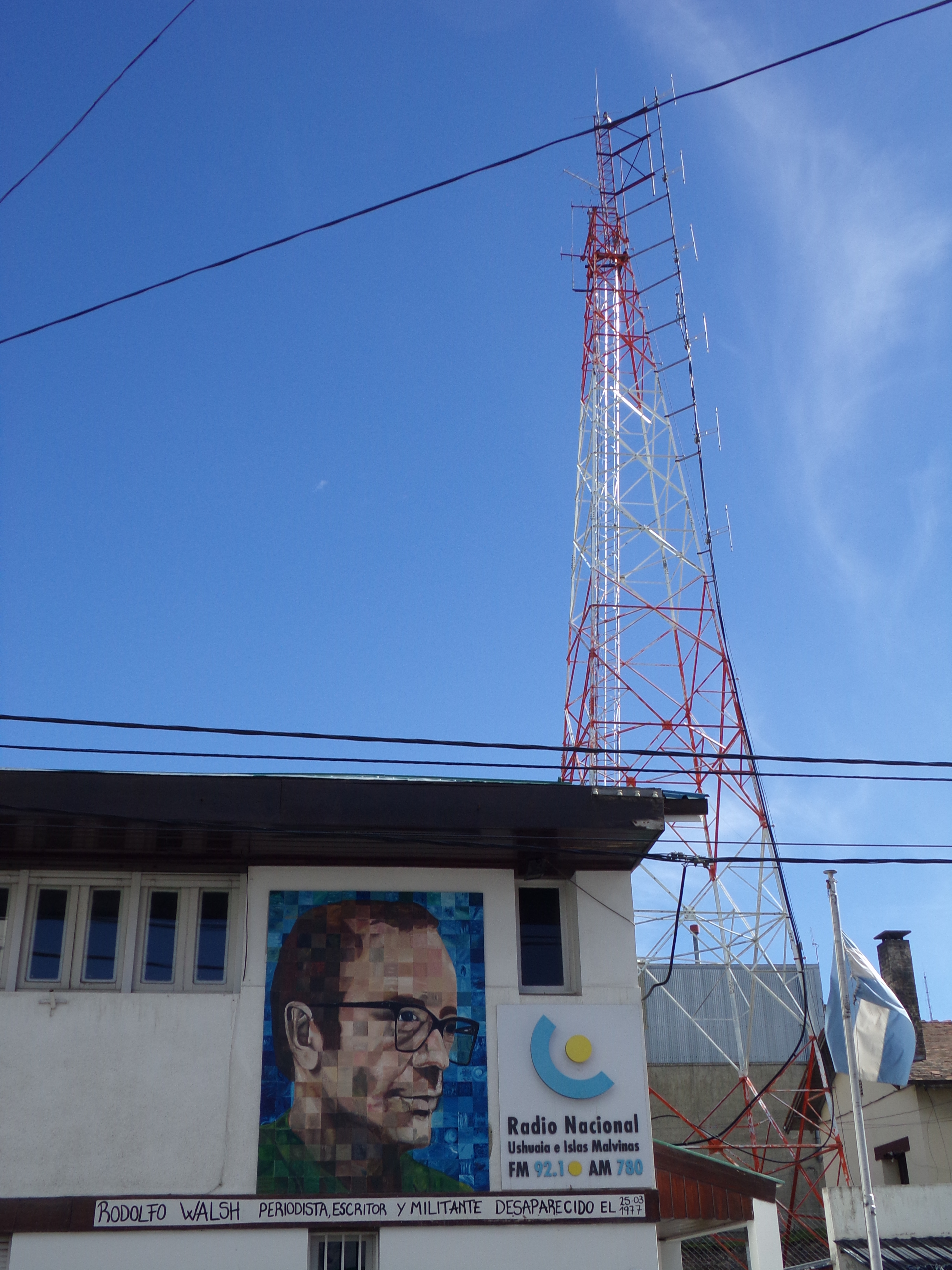 LRA 10 Radio Nacional Ushuaia e Islas Malvinas o simplemente Radio Nacional, es una radio argentina que transmite en 780 kHz por AM y 92.1 MHz por FM (LRA310), desde la ciudad de Ushuaia, Provincia de Tierra del Fuego, Antártida e Islas del Atlántico Sur.